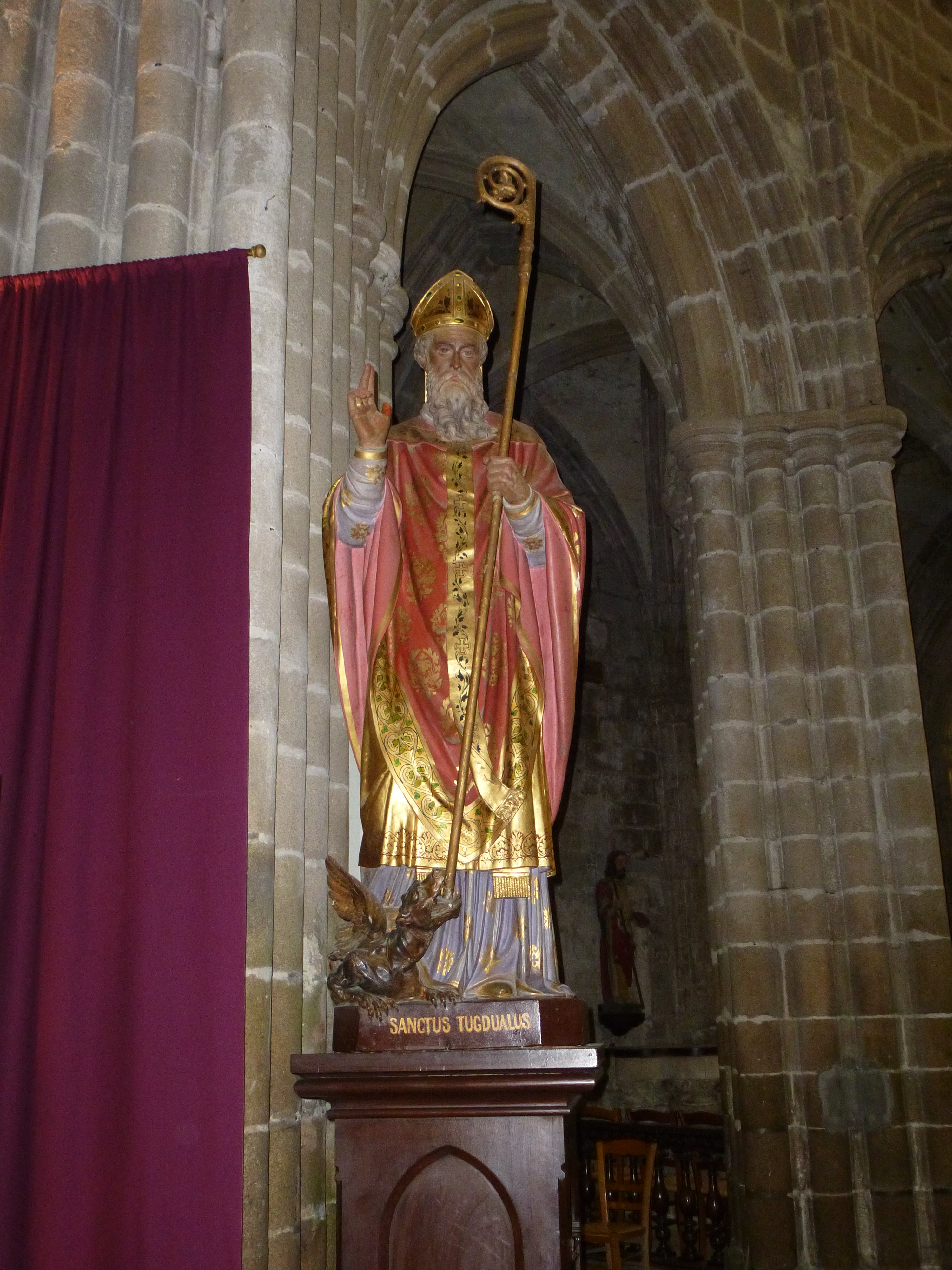 la statue de st tugdual a treguier